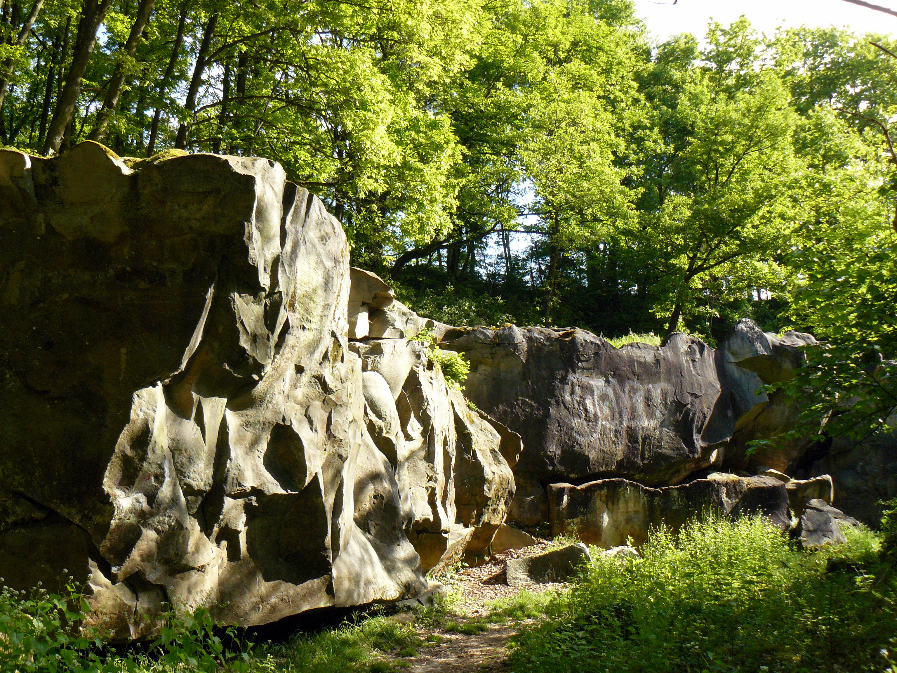 Anciennes carrières de grès de La Troche à Orsay (Essonne, France)